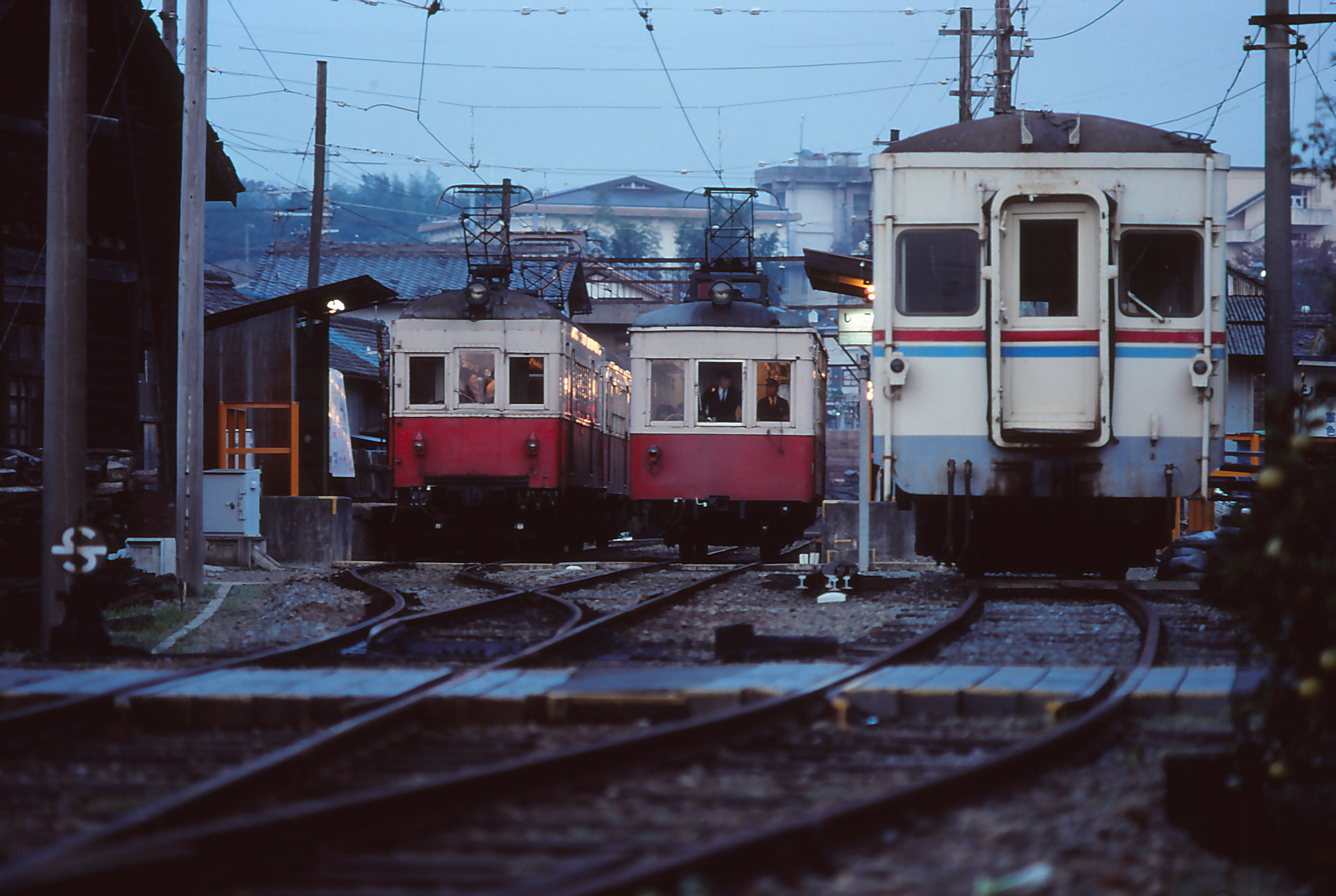 野上電気鉄道 重根駅での交換風景 手前の車両は水間鉄道から譲り受けた501形（当時、日方駅にも留置されていました）